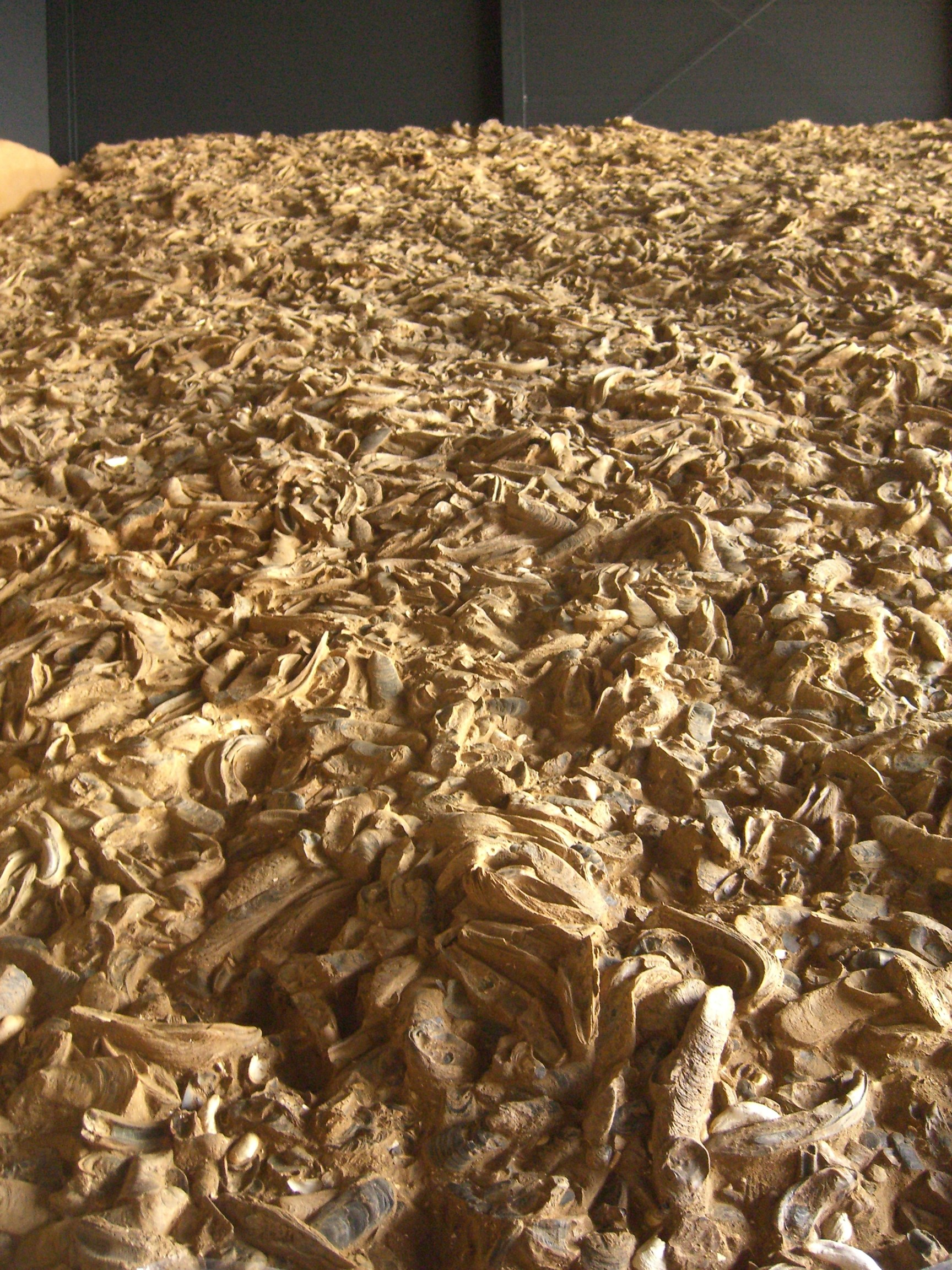 Fossile Austernbank This media shows the natural monument in Lower Austria with the ID KO-045.